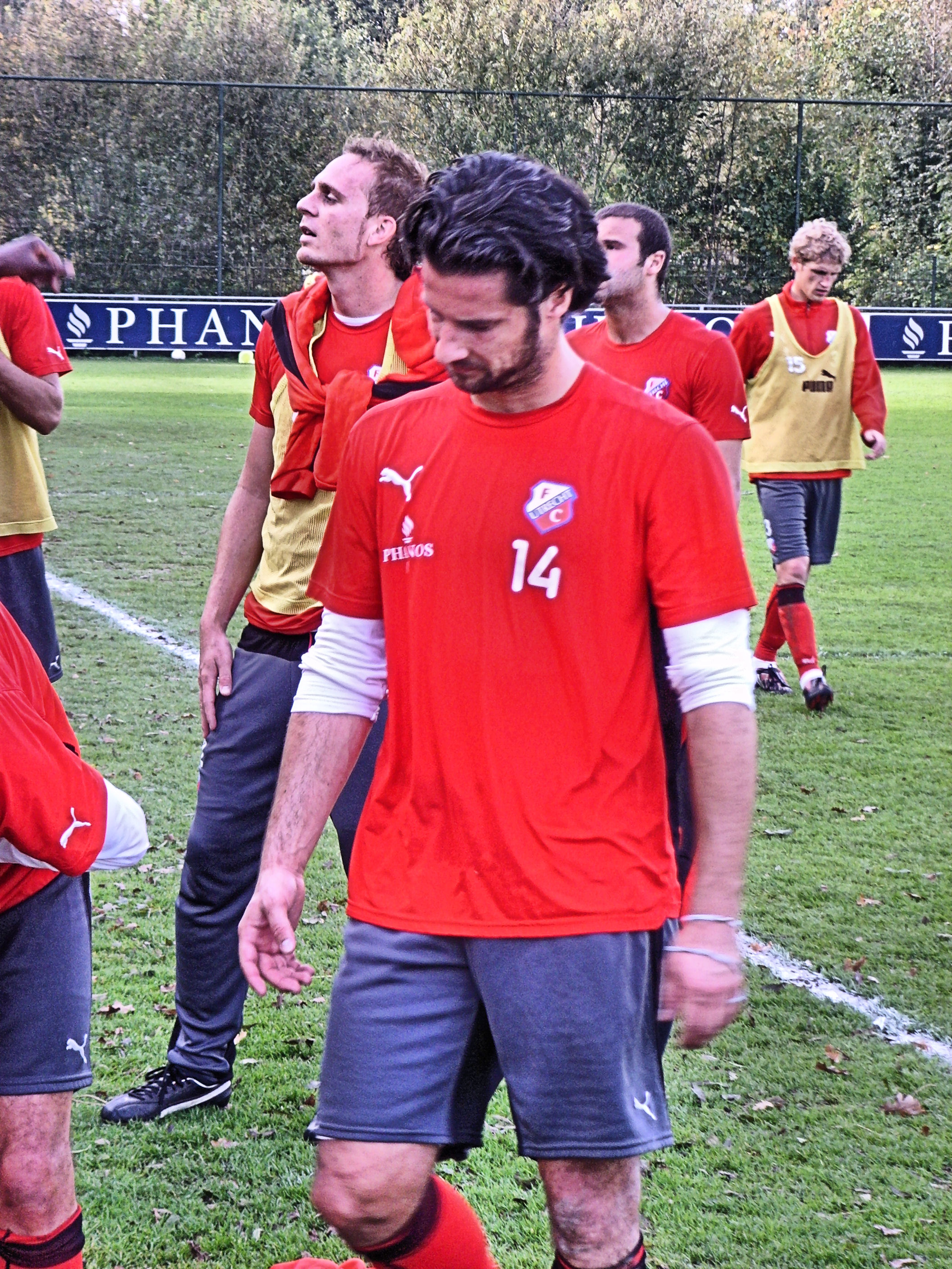 Simon Cziommer, Duits voetballer. - OpenStreetMap (Info)